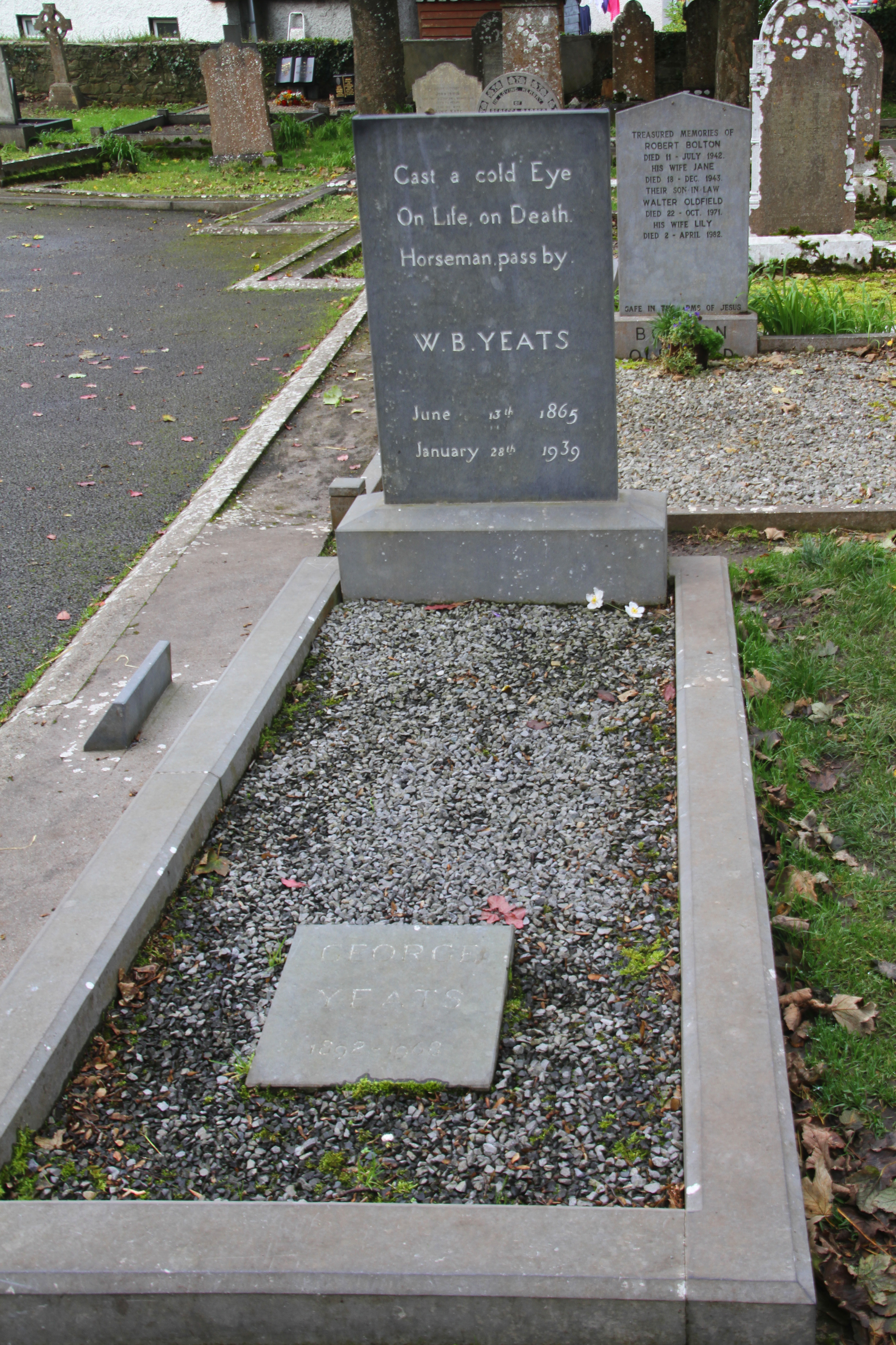 Drumcliff